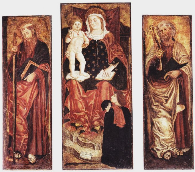 Andrea Bellunello - Trittico con Madonna e Bambino e Santi Pietro e Paolo - 1488 Olio su tavola intelata - Duomo di San Vito al Tagliamento (PN)